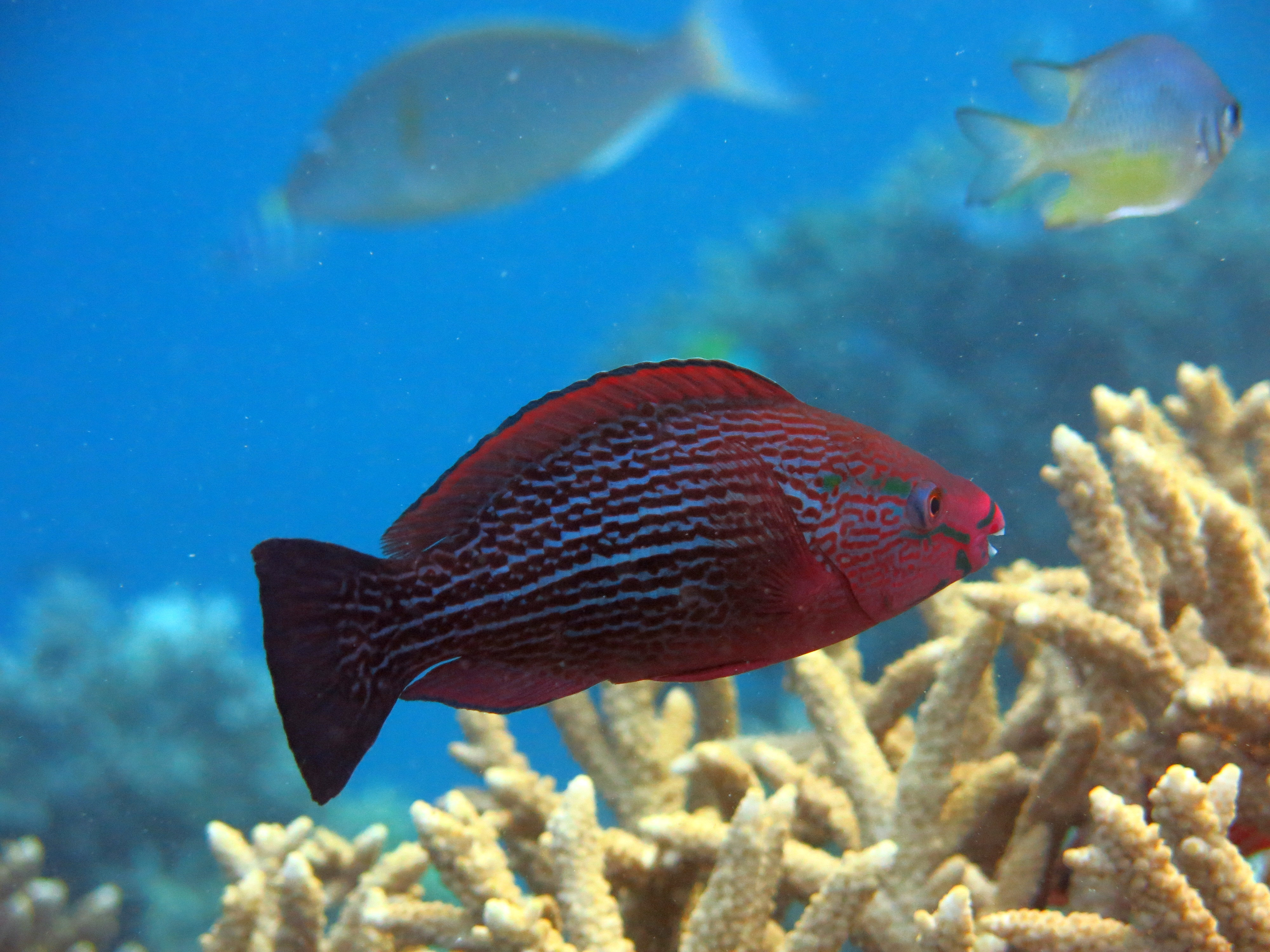 Un poisson-perroquet brun (Scarus niger) femelle aux Maldives (atoll de Baa).